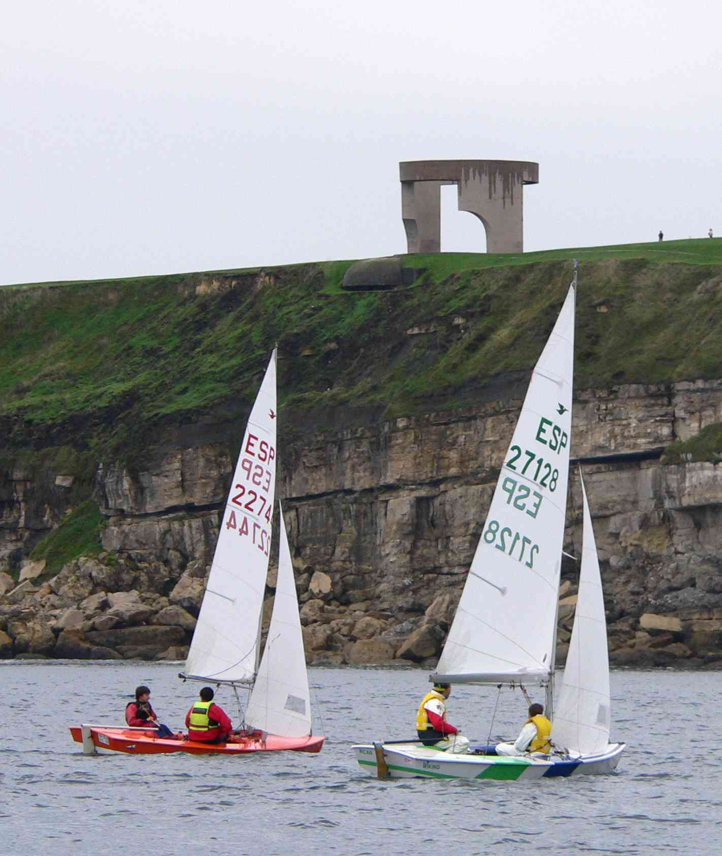 Snipe dinghies in Gijon, Spain, september 2006